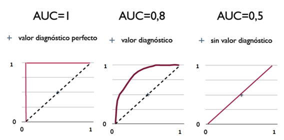 Curvas ROC